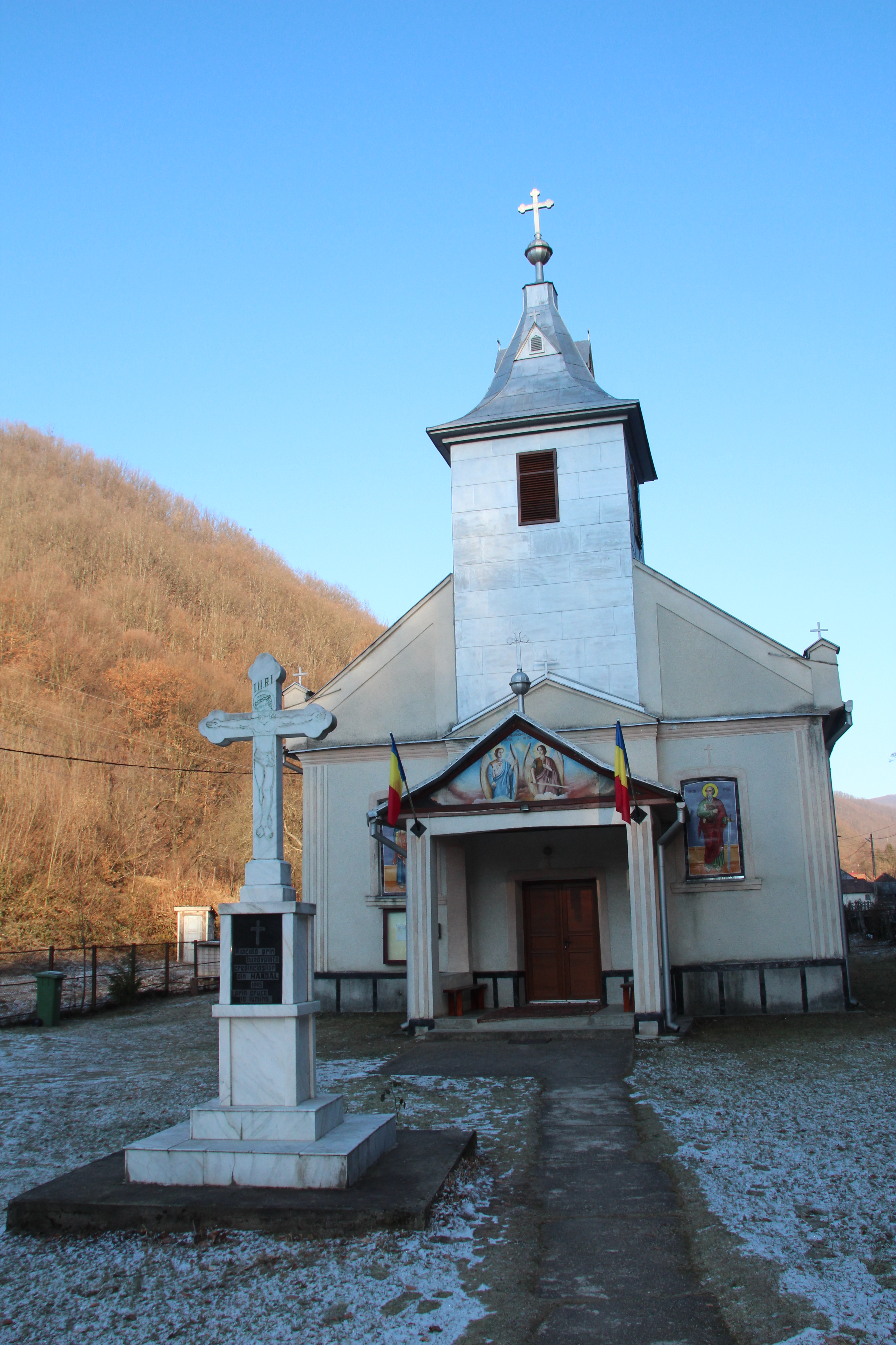 Rumensk ortodoks kirke